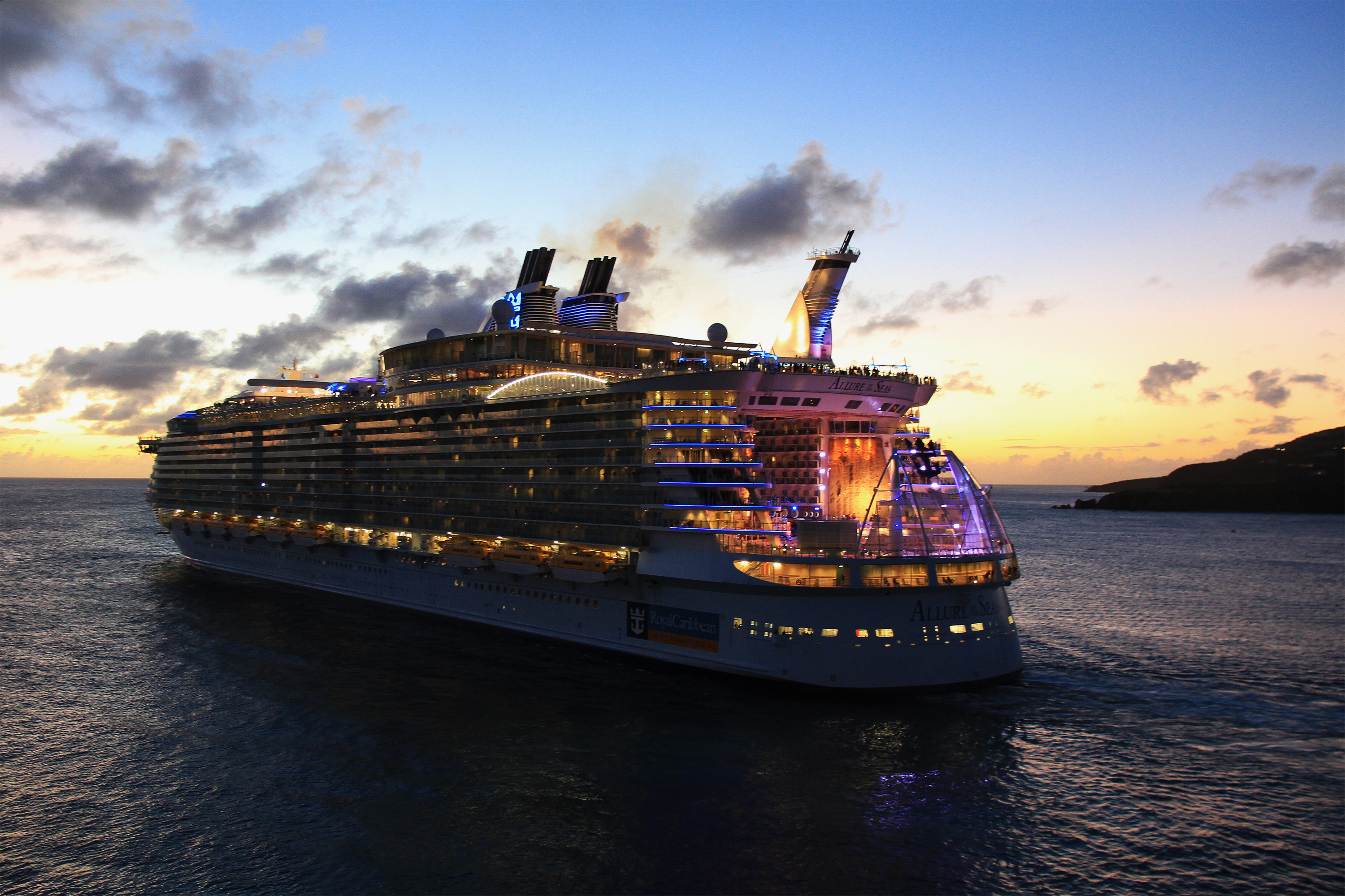 Allure of the Seas in the Harbour of the Isle Sint Maarten